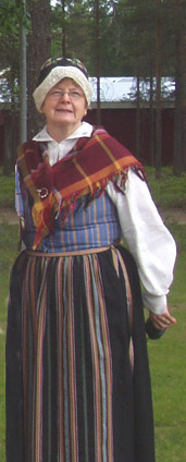 Solvår Nordvik Persson i västerbottensdräkt på barndop sommaren 2003. Fotot taget av Tobias Ossmark, rättigheterna överlåtna 2012-01-07 ("du har självklart rätten till fotot på er alla!")